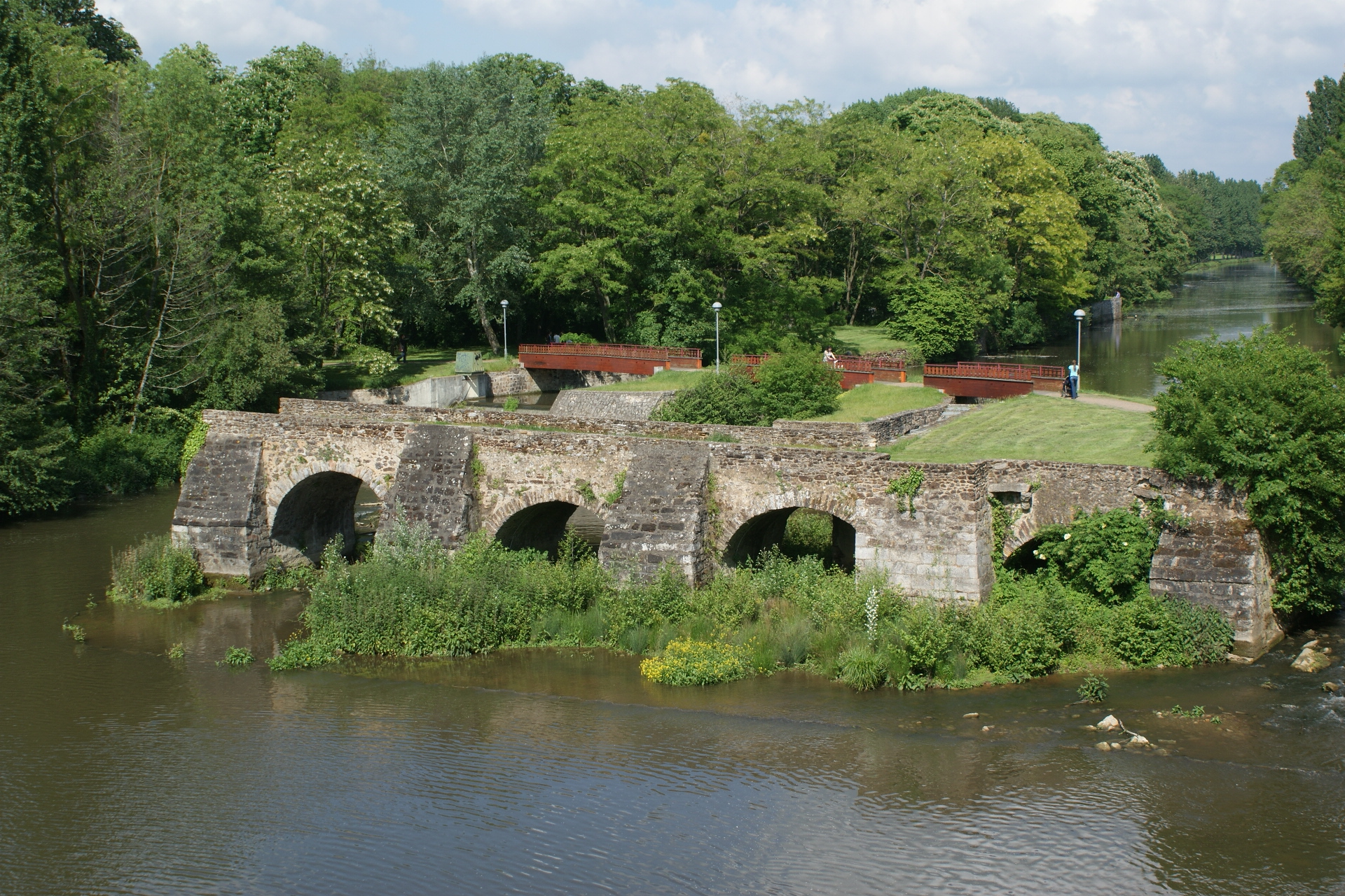 Le pont des vendéens au Mans, en partie détruit au cours de la virée de Galère pour empêcher les Vendéens de venir s'installer au Mans.